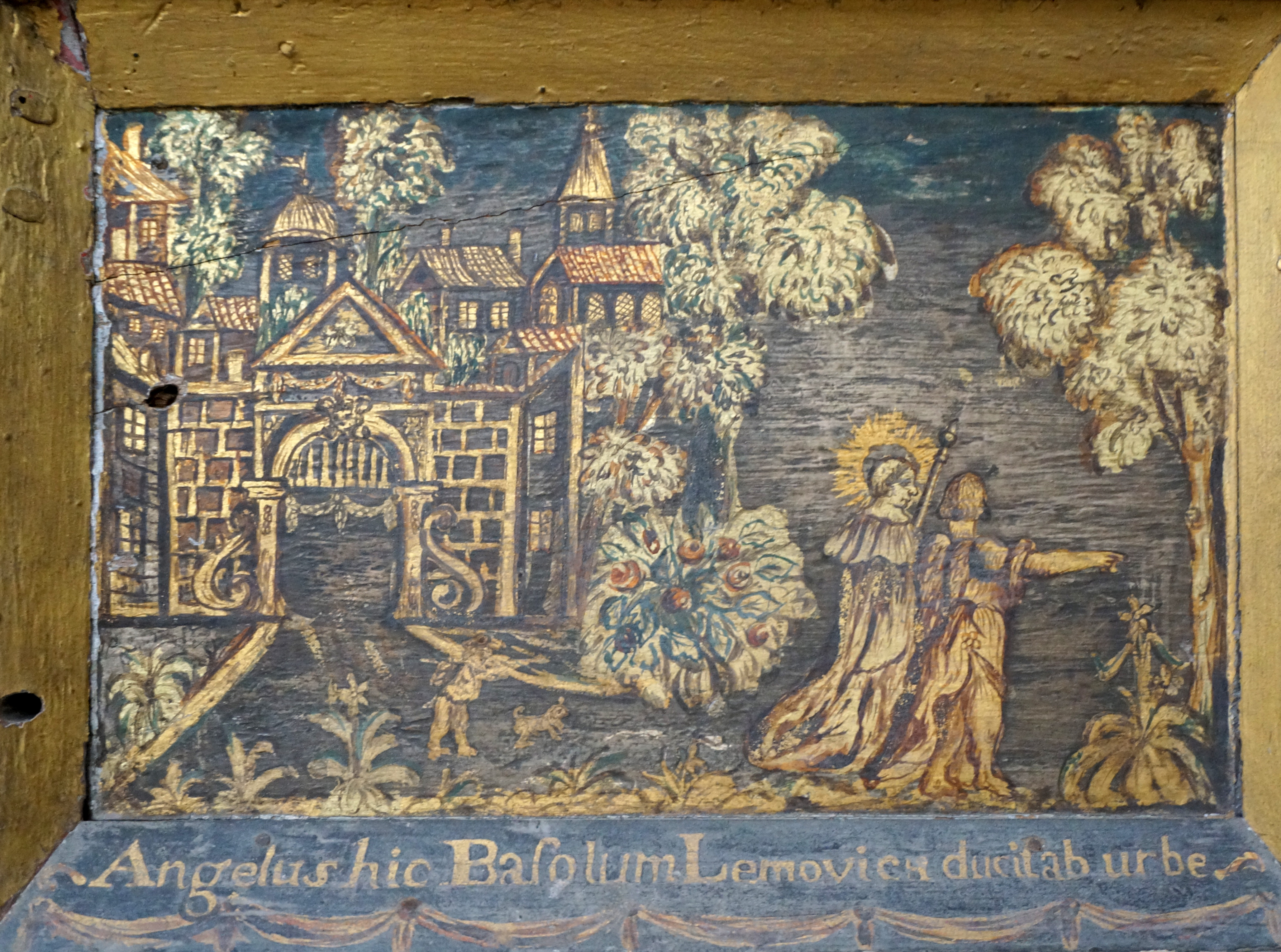 Histoire_du_moine_Basle, détail de panneaux exposés en l'église.